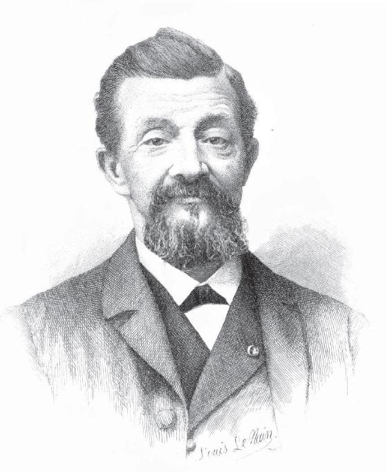 Portret van Alphonse Wauters (13 april 1817 – 1 mei 1898), stadsarchivaris van Brussel (1842-1898)